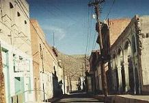 Clifton, Arizona